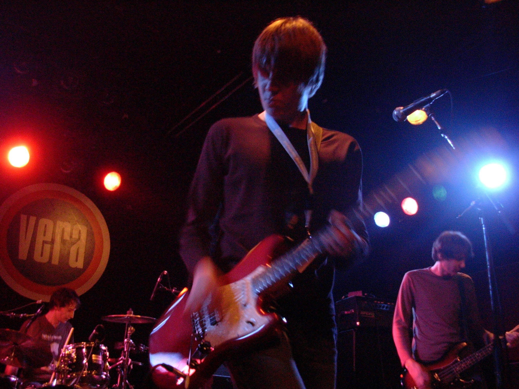 Группа Hot Zex на сцене клуба Vera, город Groningen, Нидерланды.